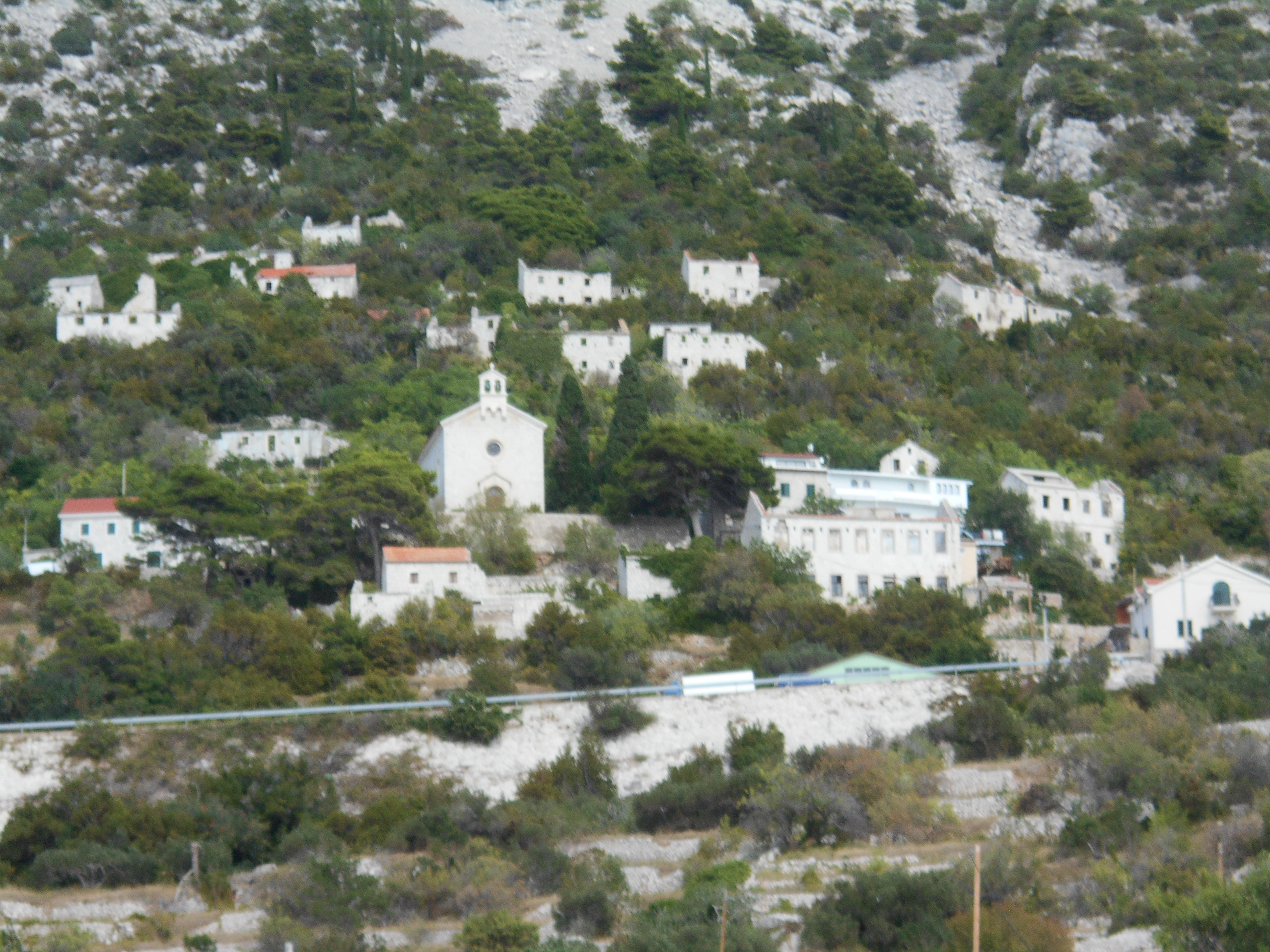 Pohled na Šulente (severní část Drašnice) a nový kostel sv. Jiří